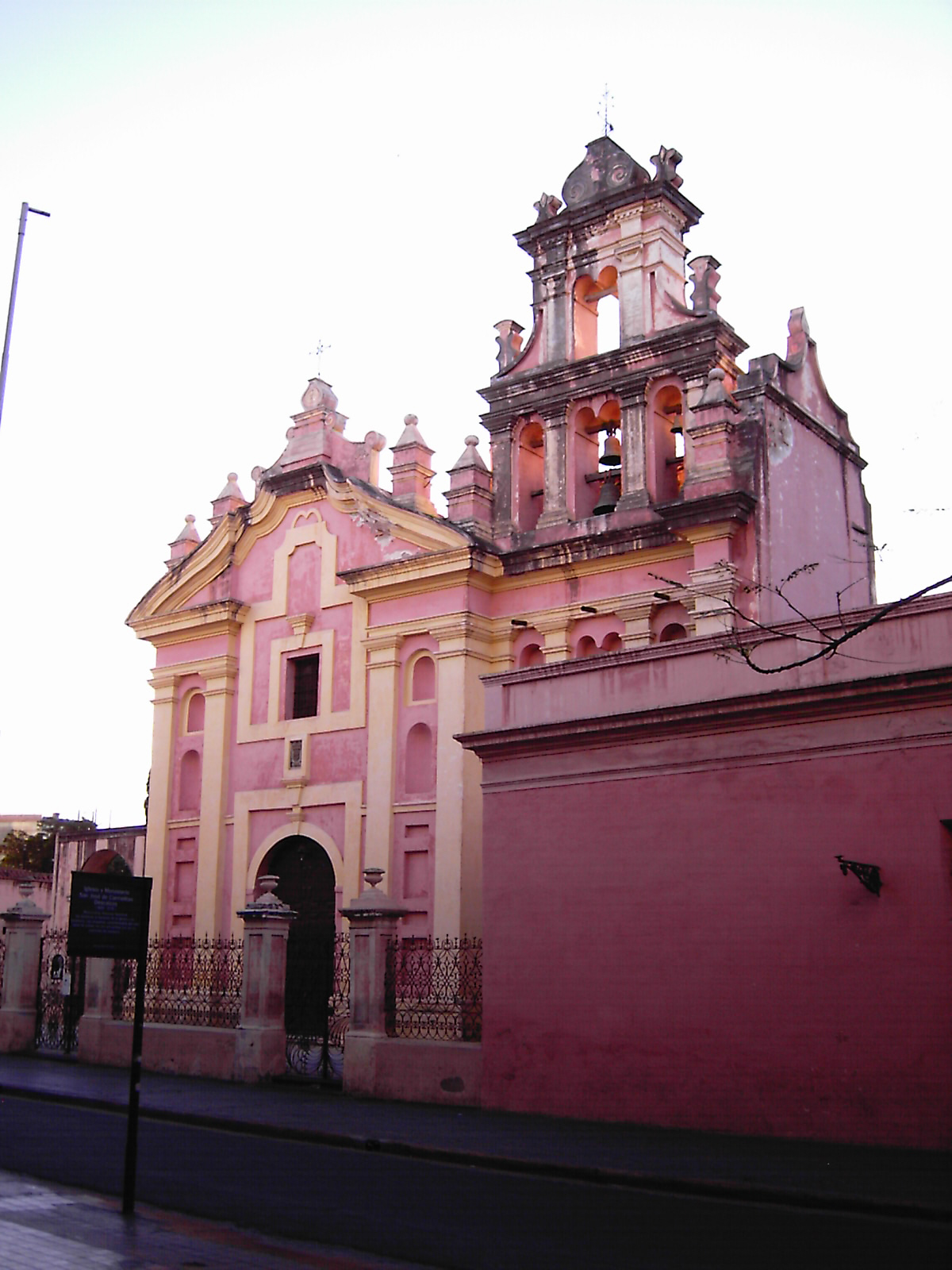 Convento en Córdoba, Argentina